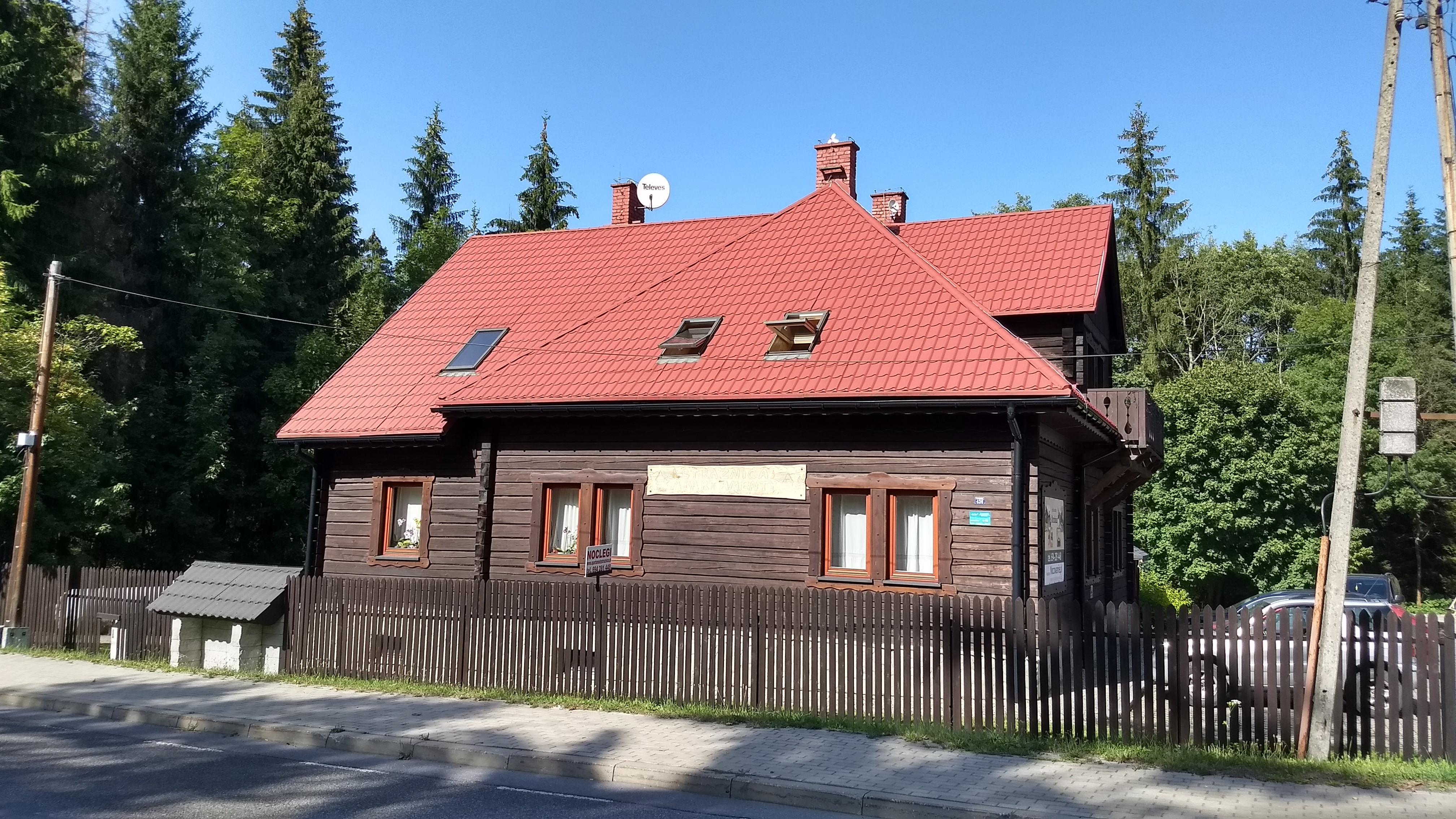 Jaworzynka, była Strażnica Wojsk Ochrony Pogranicza (WOP) Jaworzynka, następnie Strażnica Straży Granicznej (SG) w Jaworzynce, od 24.08.2005 do 15.01.2008 roku placówka Straży Granicznej. Obecnie prywatne budynki